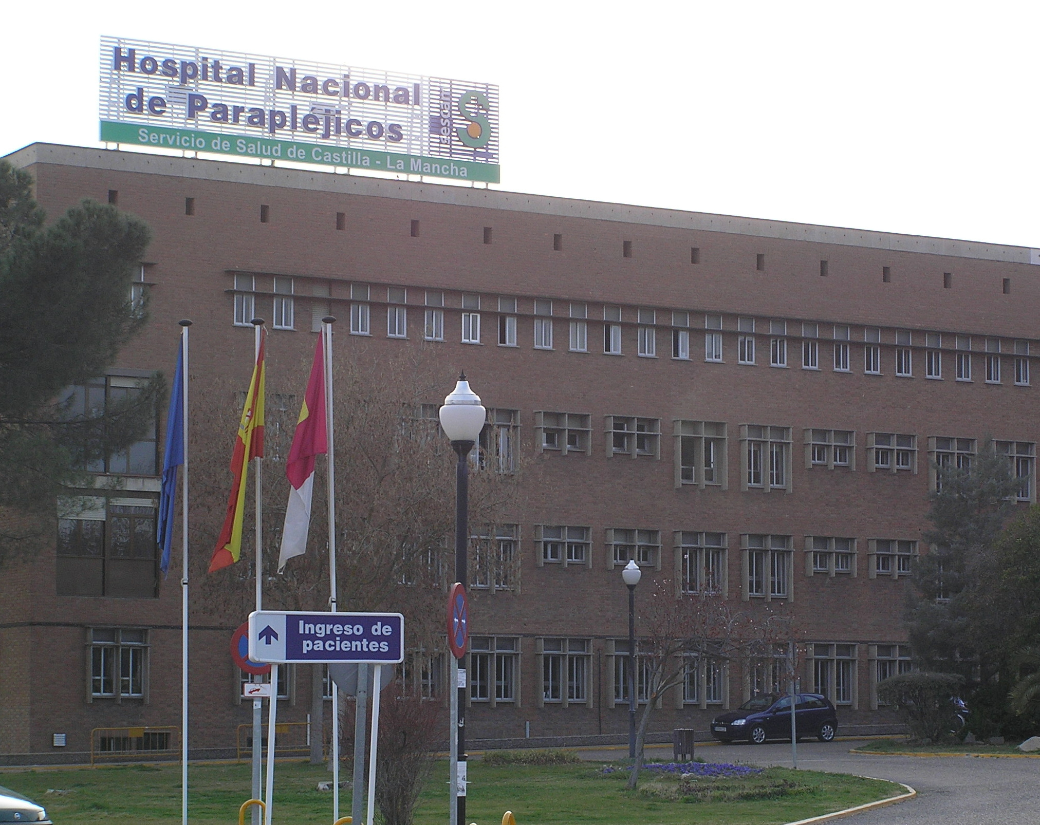 Hospital Nacional de Parapléjicos de Toledo (España) Author: Mr. Tickle Date: March 16th, 2006 Place: Toledo, Spain